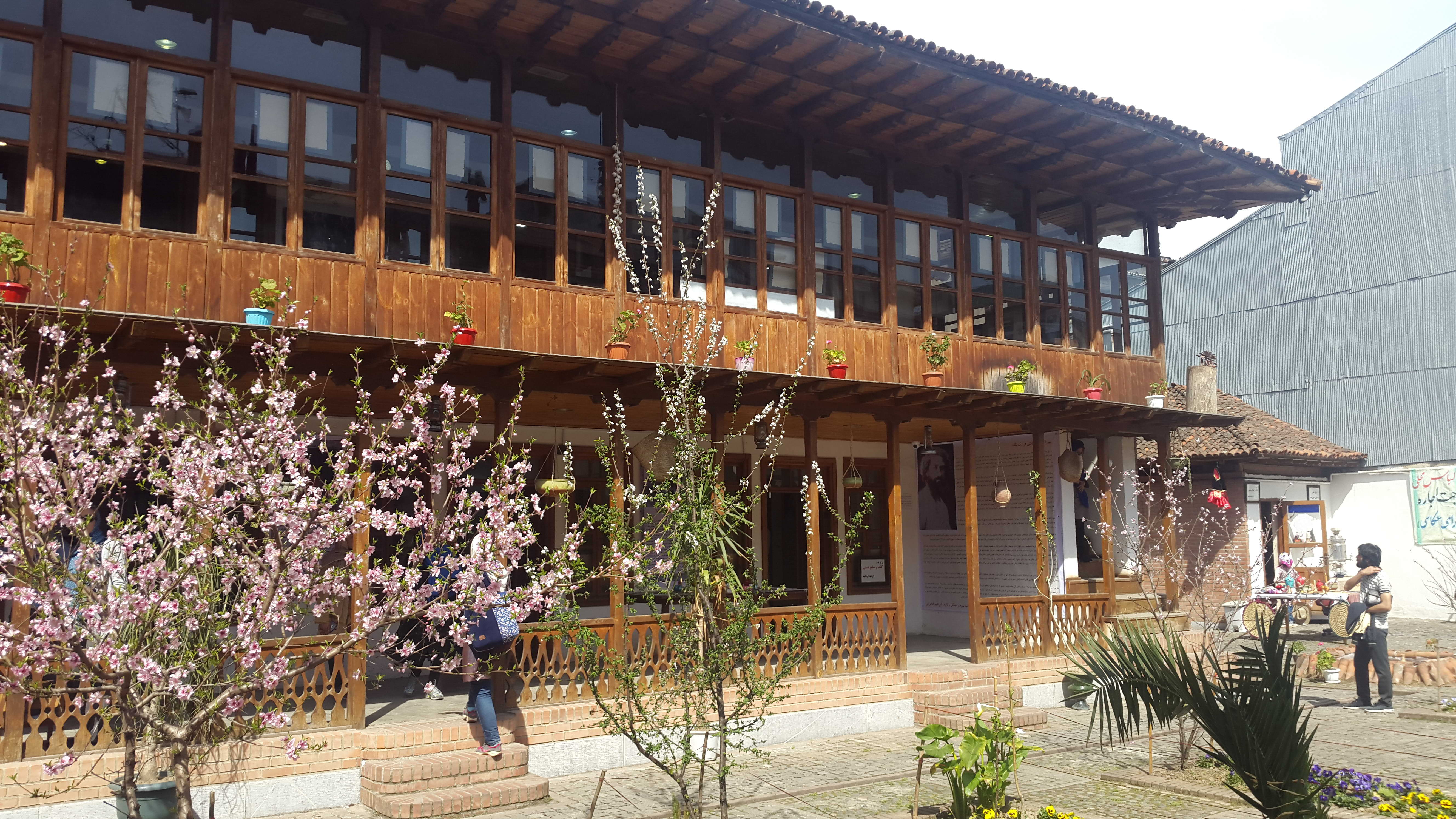 خانه سردار جنگل